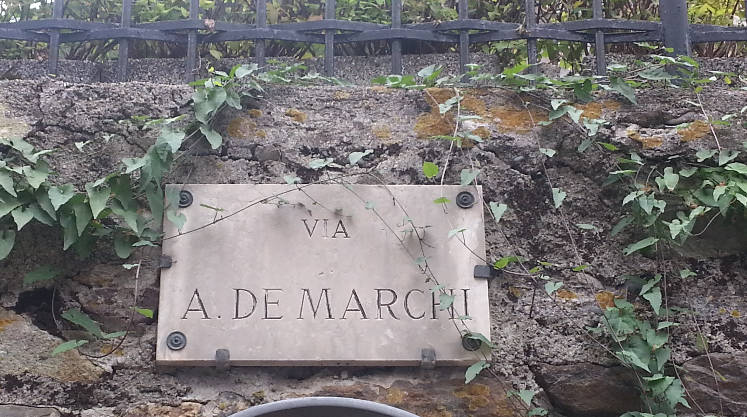 epigrafe della via di Gromo intitoalta ad Attilio De Marchi